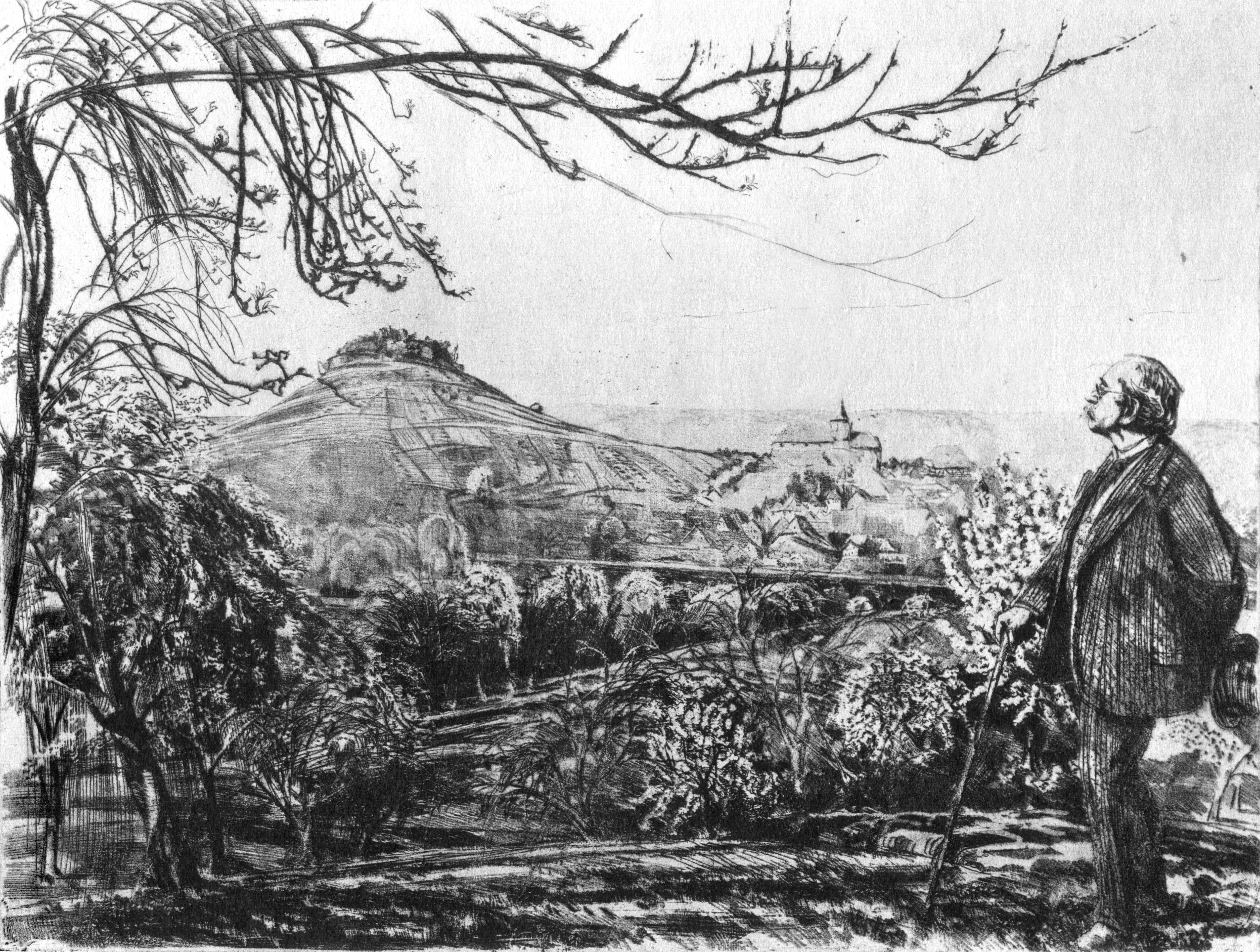 Ehrenbürgerbrief der Stadt Weinsberg für Privatier Erwin Hildt. Hildt rechts spazierend, im Hintergrund Stadt Weinsberg und Burgruine Weibertreu, vorn blühende Obstbäume. Op. 105a,1 im Katalog der Radierungen. Strichätzung und Roulette auf Zink, Plattengröße 350×455 mm